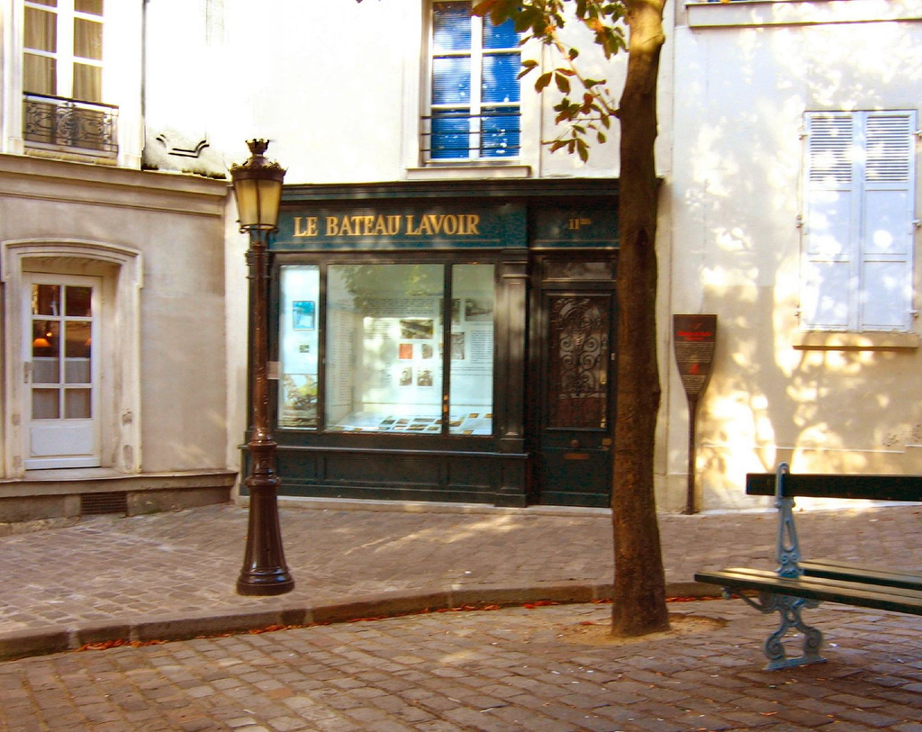 Bateau Lavoir in Paris, France